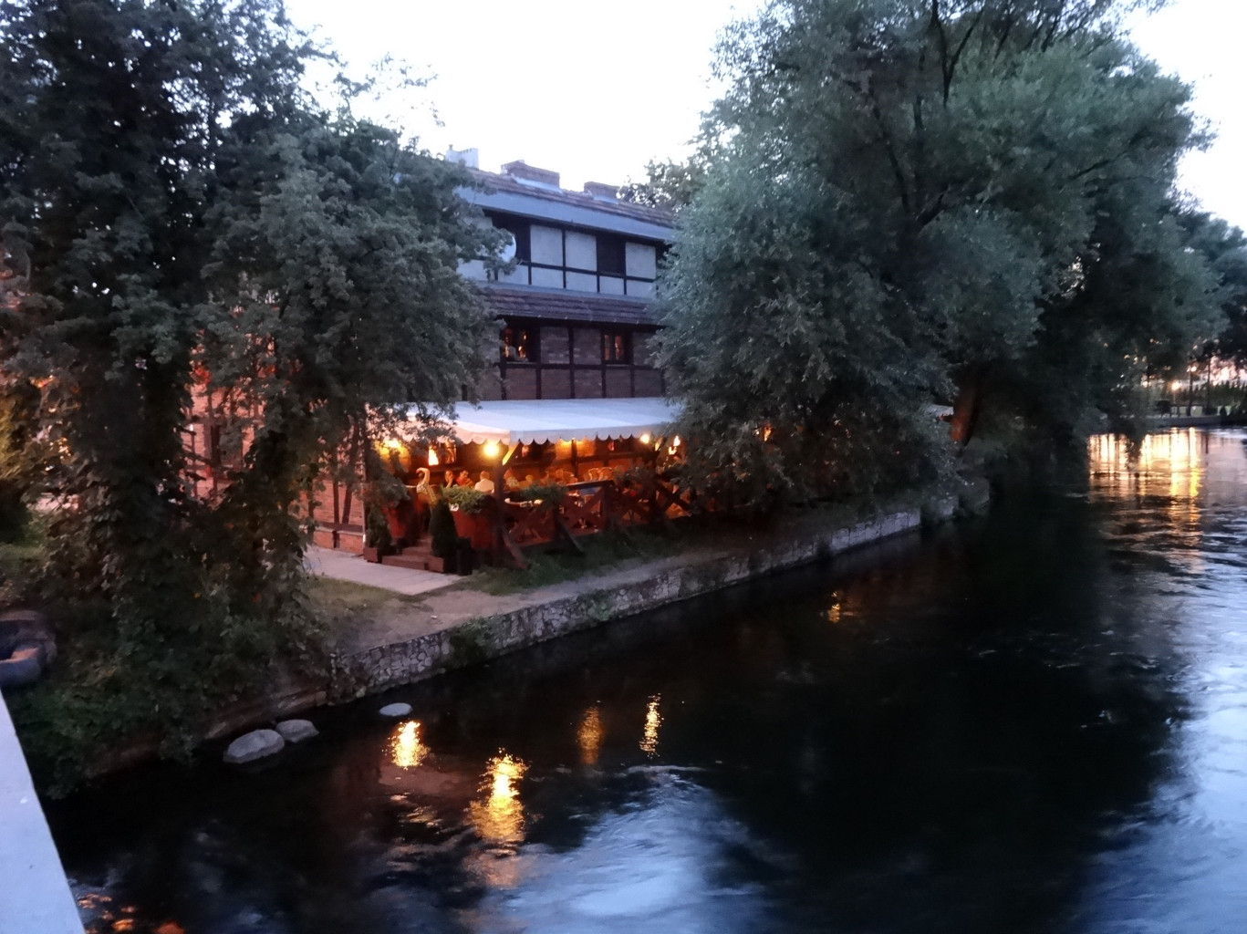 Budynek szachulcowy zwany Karczmą Młyńską zlokalizowany na Wyspie Młyńskiej w Bydgoszczy, zbud. około 1835 roku